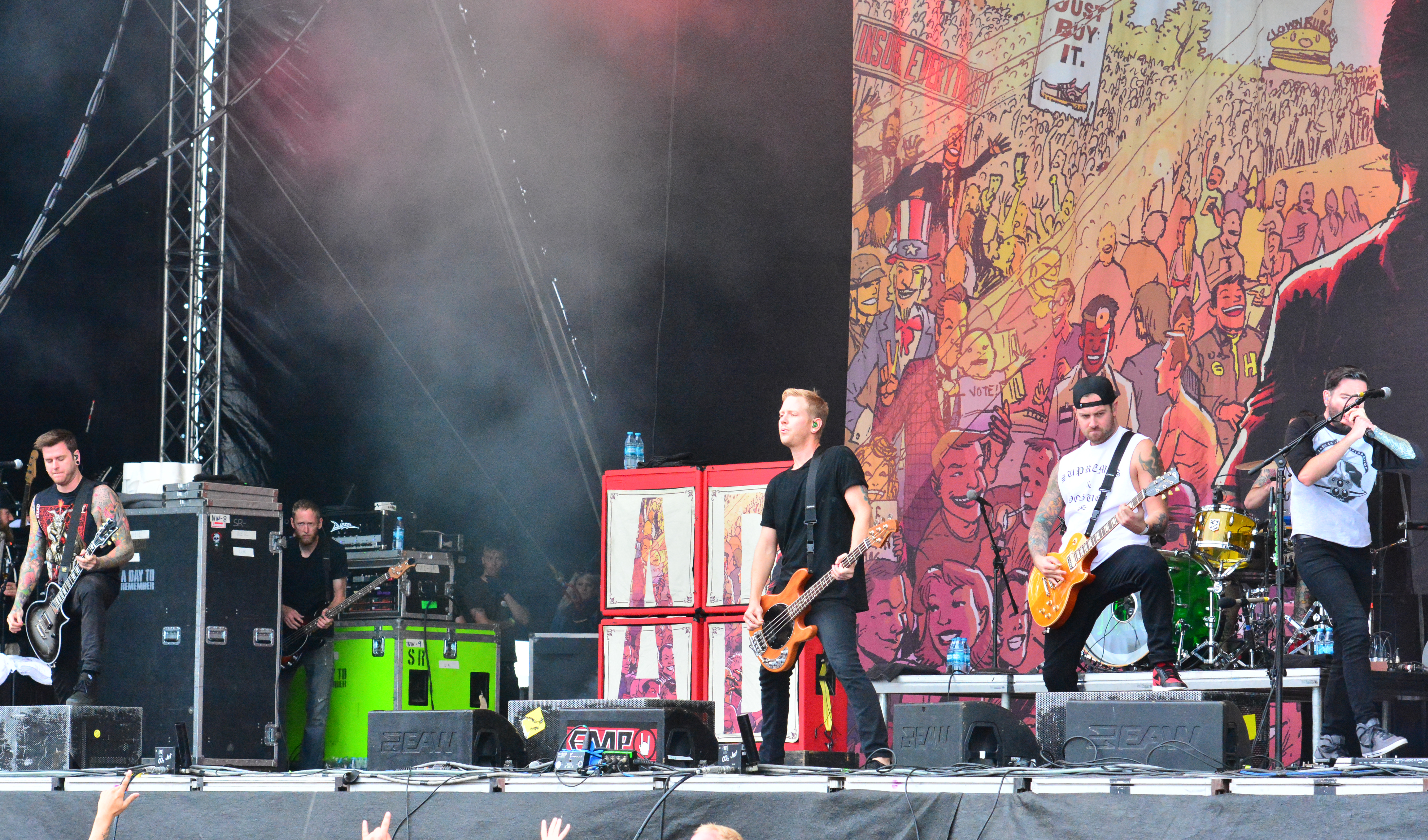 A Day to Remember beim Elbriot 2014